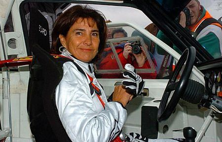 Michèle Mouton en el Audi Quatto S1 con el que ganó el Pikes Peak International 1985. La foto fue tomada durante el International Historic Motorsport Show, en Stoneleigh Park, en Gran Bretaña.